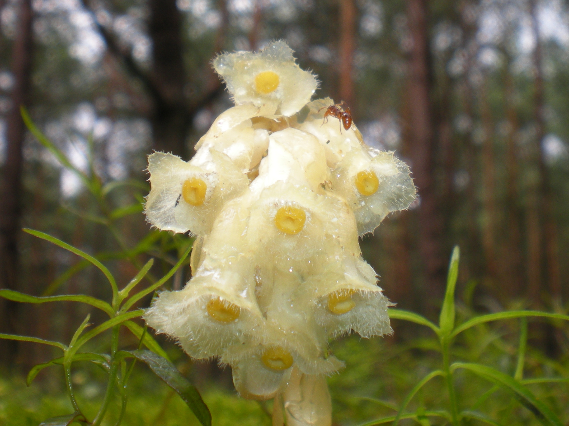 Fichtenspargel (Monotropa hypopitys) in Polen